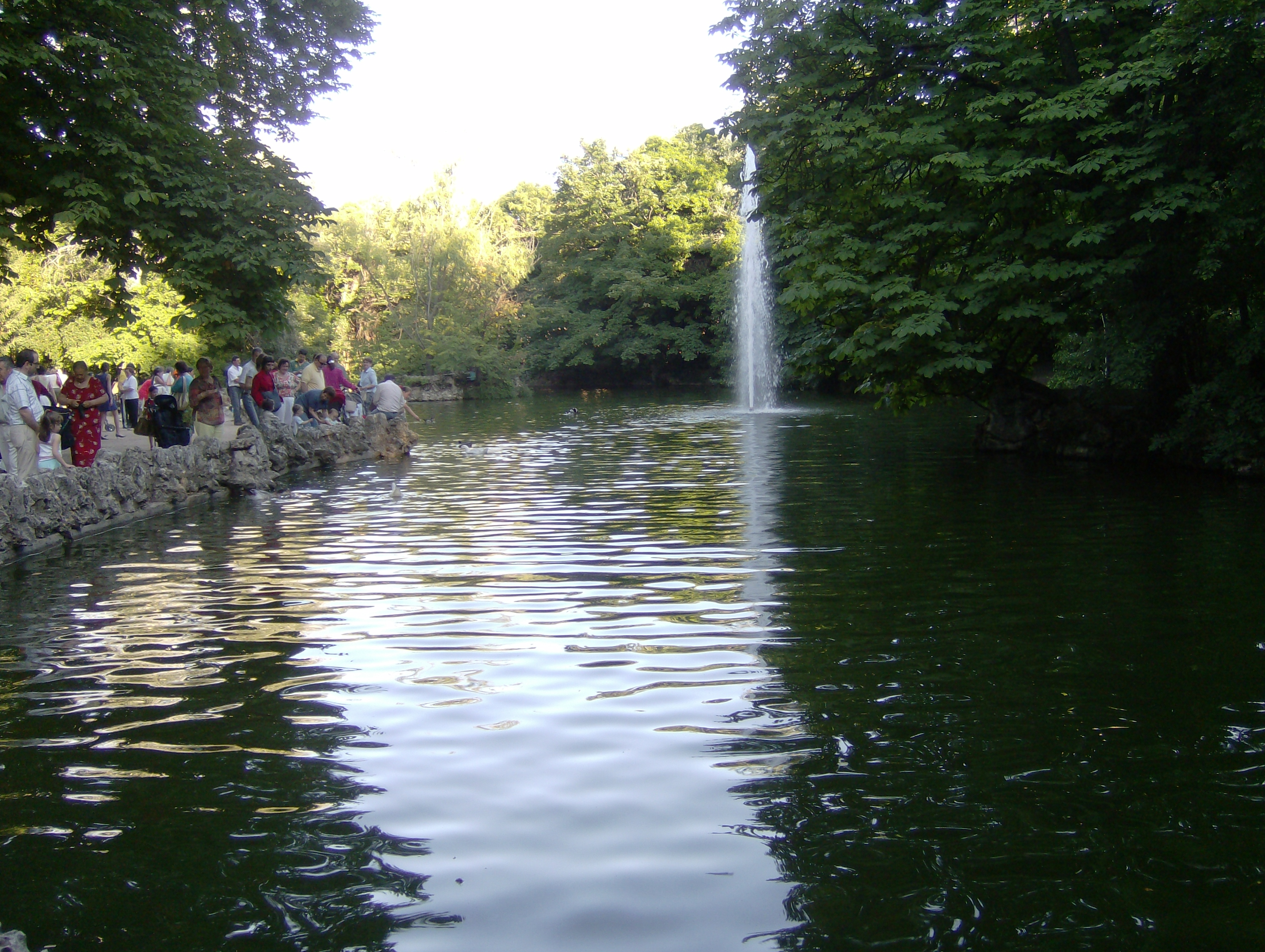 Estanque del Campo Grande de Valladolid